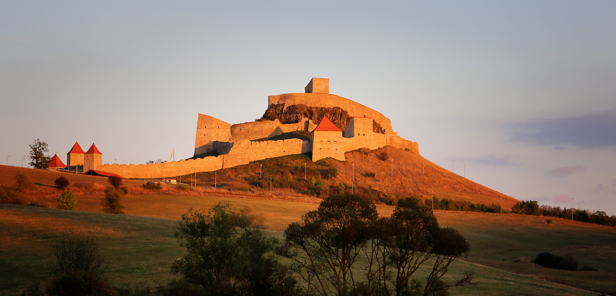 Cetatea Rupea (Cetatea Cohalmului)